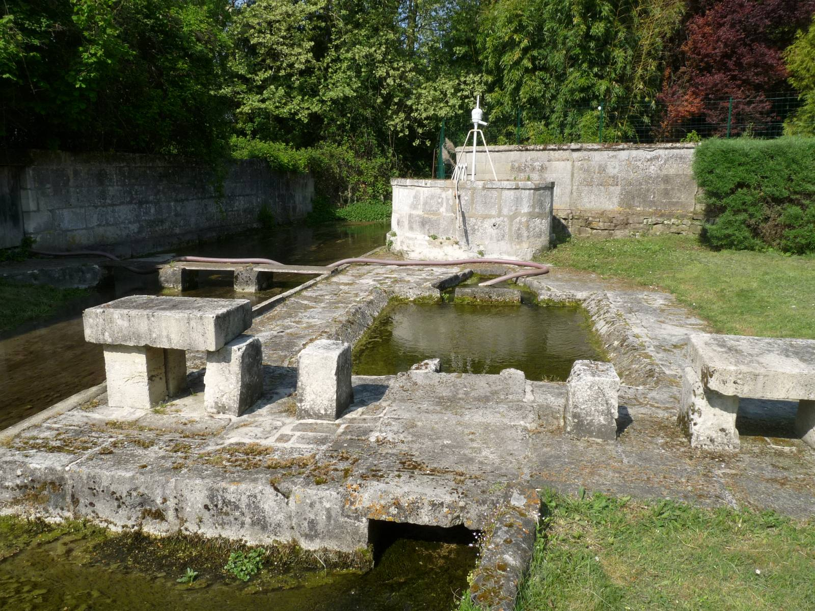 Fontaine et lavoir de Triac, Triac-Lautrait, Charente, France